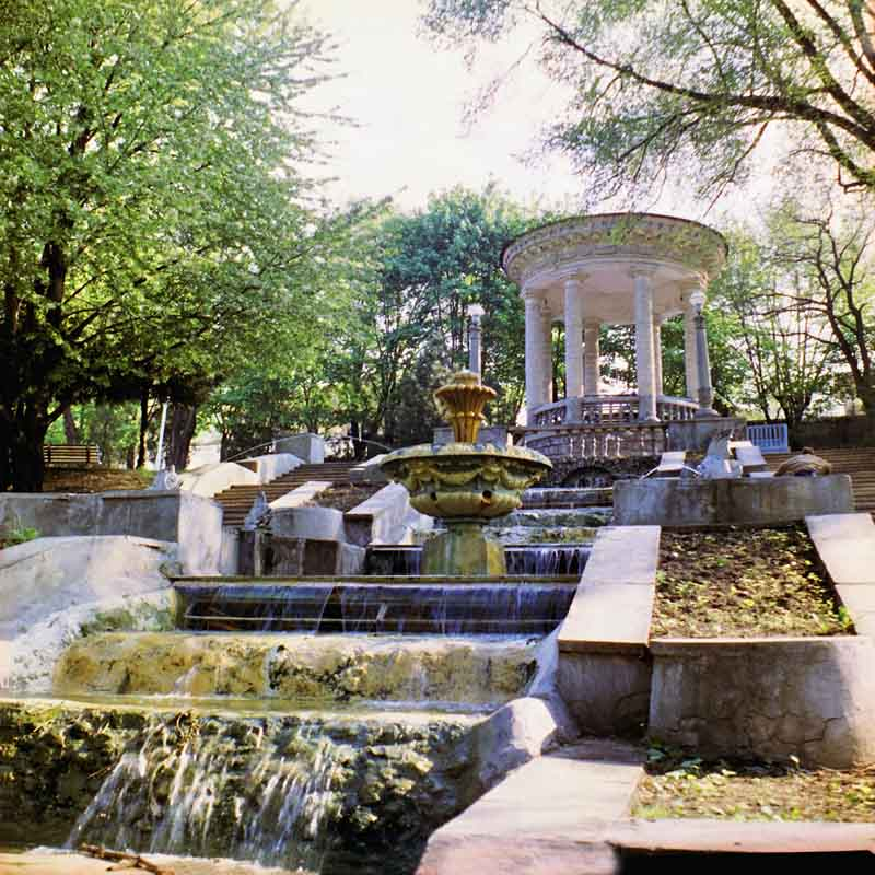 Valea Morilor (1968).